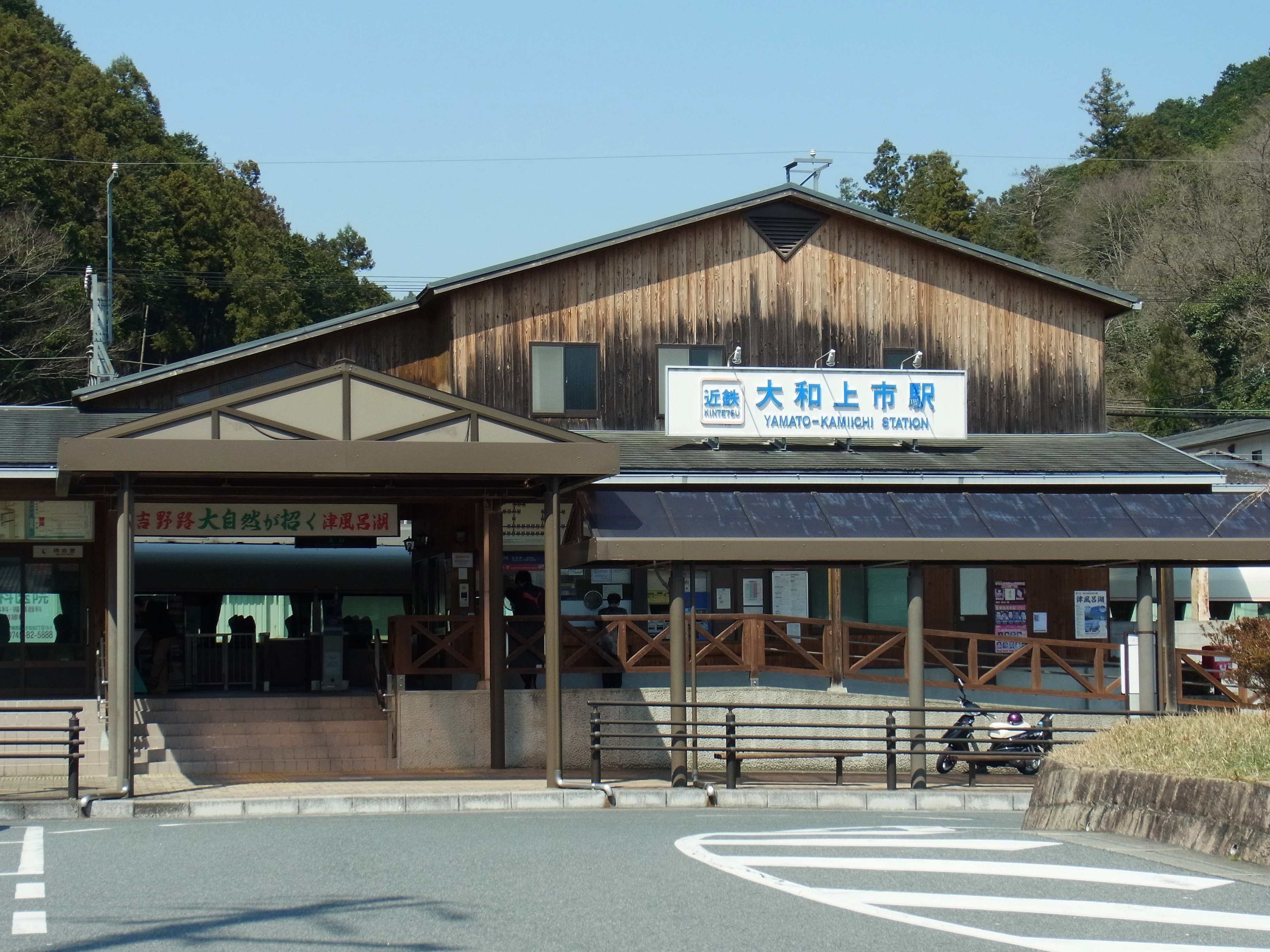 近鉄吉野線 大和上市駅 2012.4.08